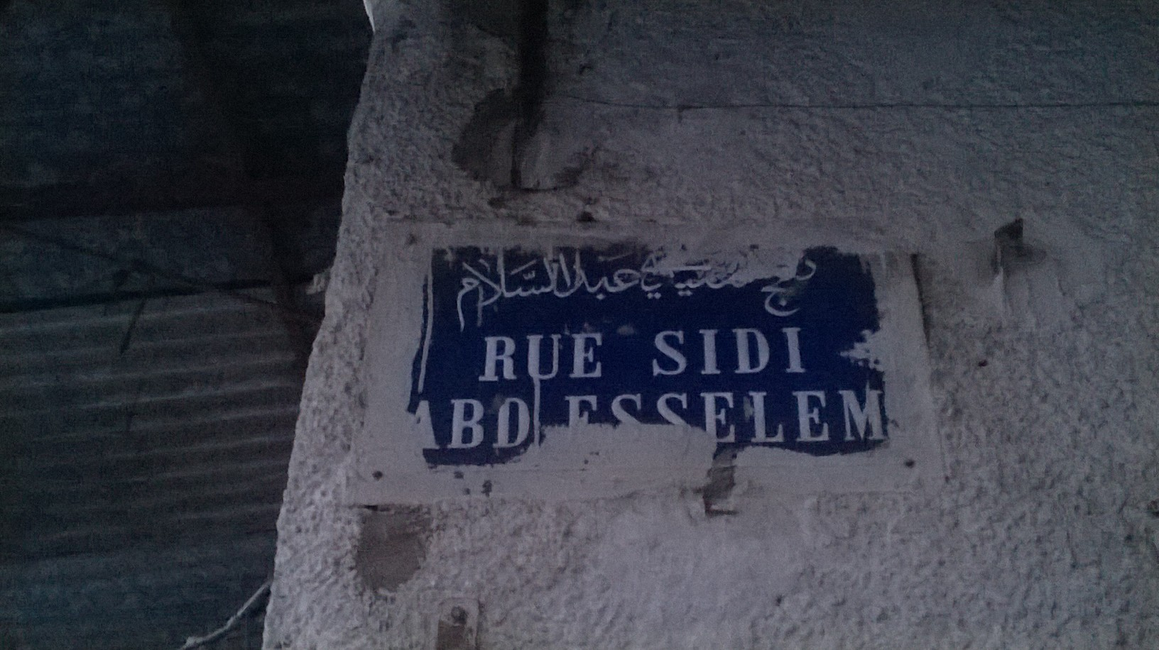 Bab Sidi Abdessalem , Tunis باب سيدي عبد السلام ، تونس